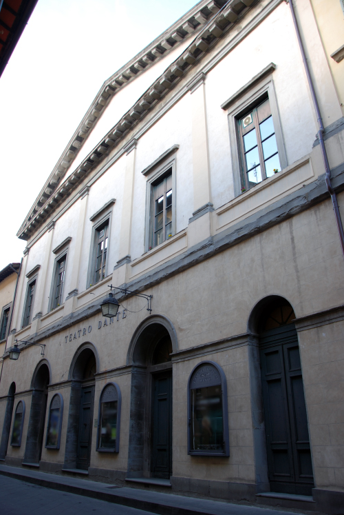 Vista frontale Cinema Teatro Dante, Sansepolcro